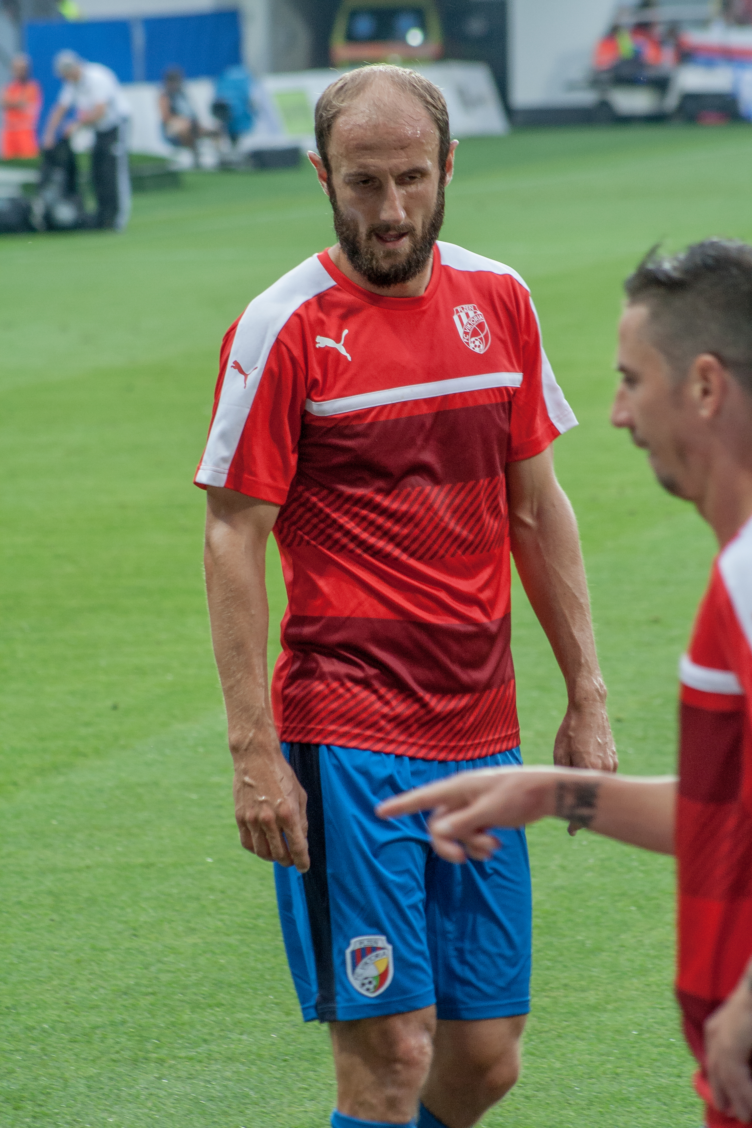 Plzeň - Karabach